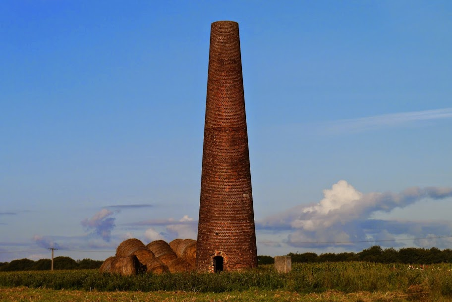 Cette pyramide située sur le sommet du département Pas-de-Calais, servait jadis de sémaphore. Elle est présente Rue de la Pyramide, 62850 Alquines.